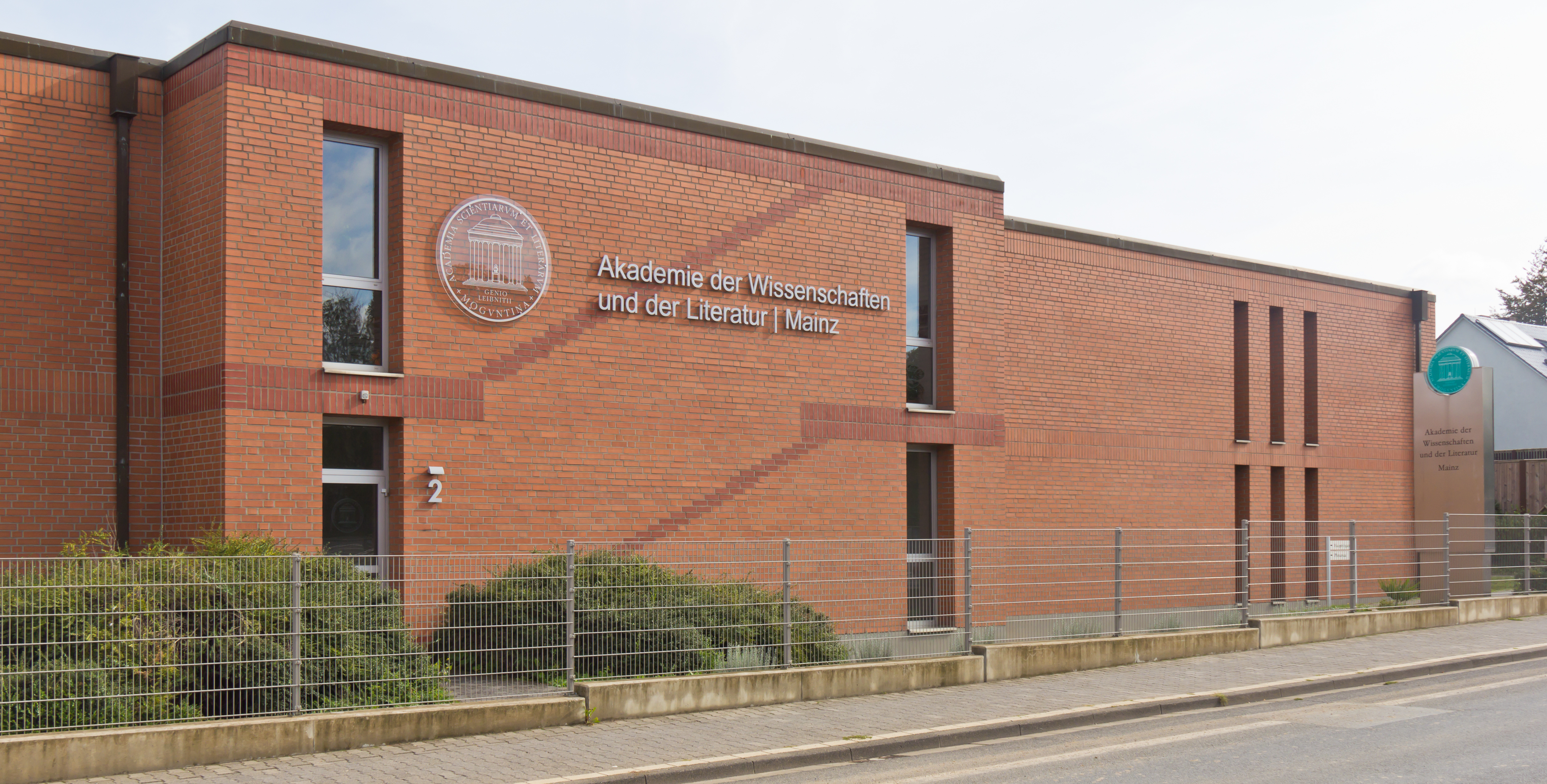 Akademie der Wissenschaften und Literatur Mainz. Außenansicht Geschwister-Scholl-Straße 2, Mainz.